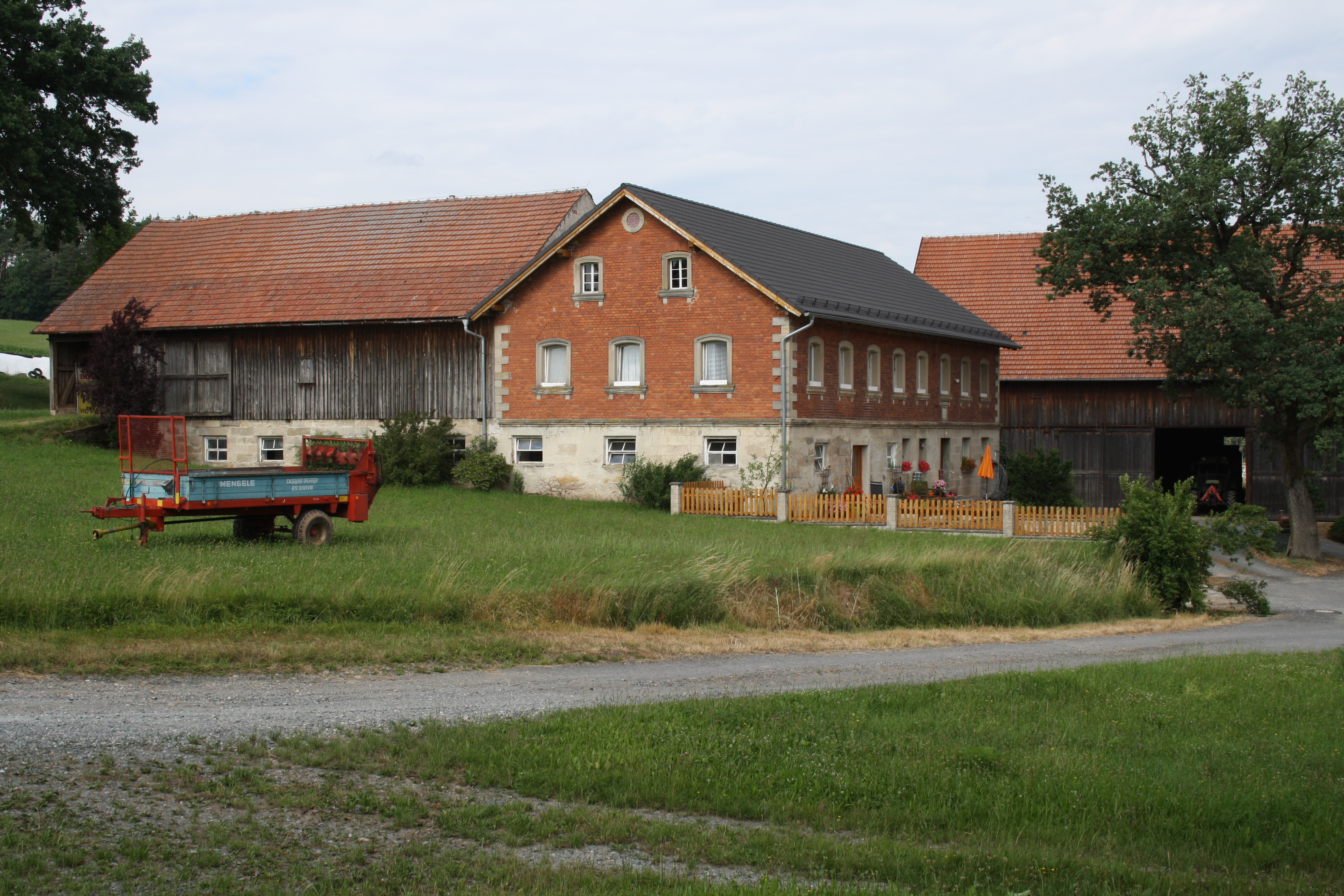 Bauernhof Raps'n in Bayreuth Wolfsbach